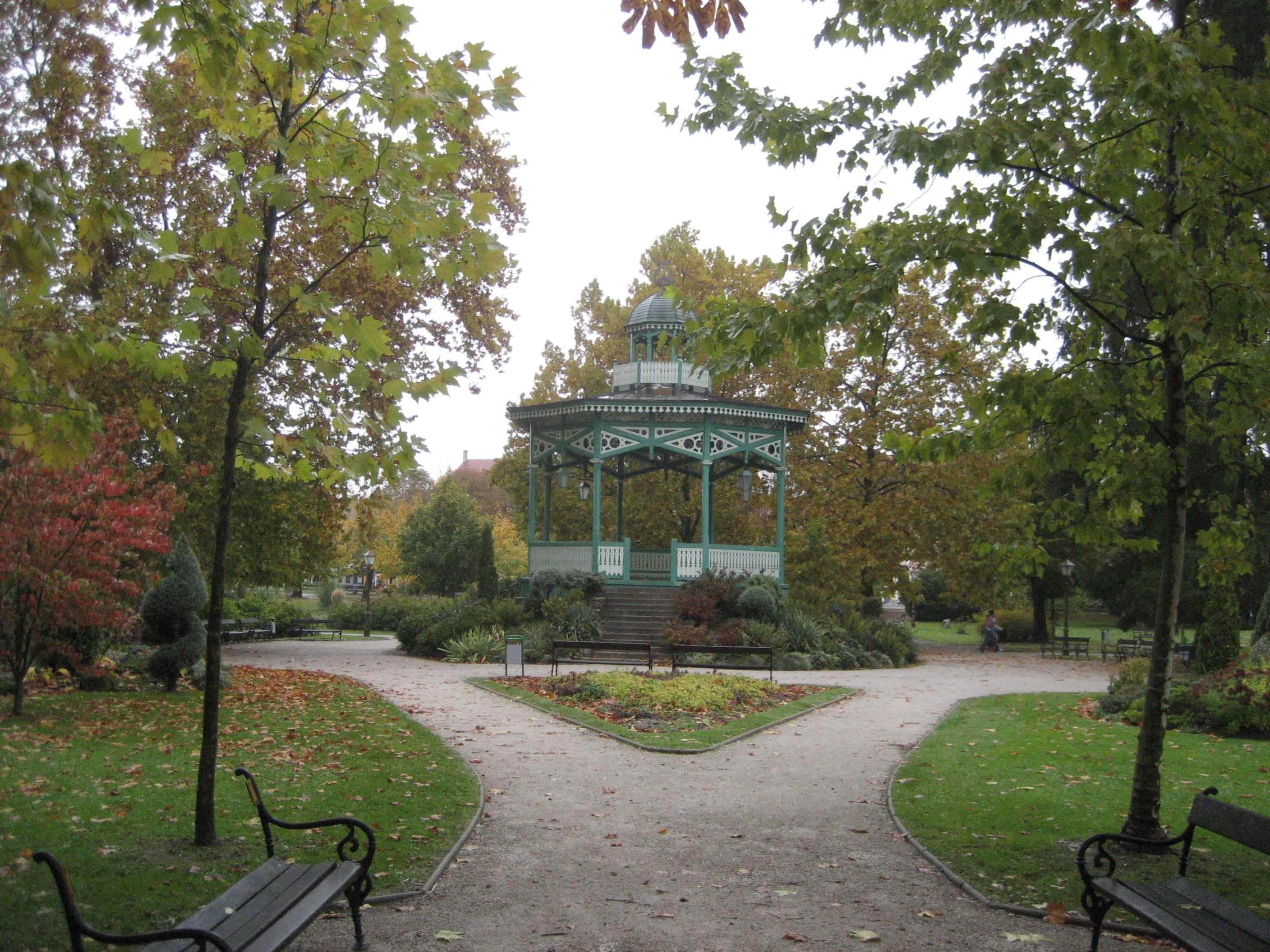 Pagoide im Stadtpark von Koprivnica